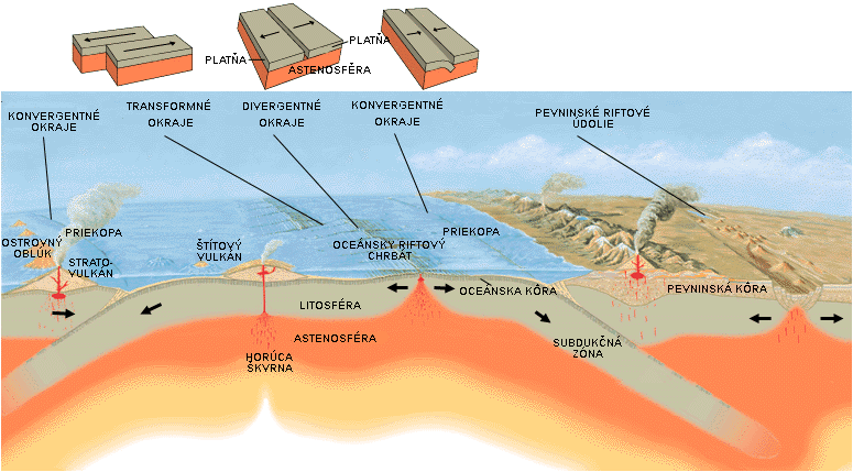 Okraje tektonických platní